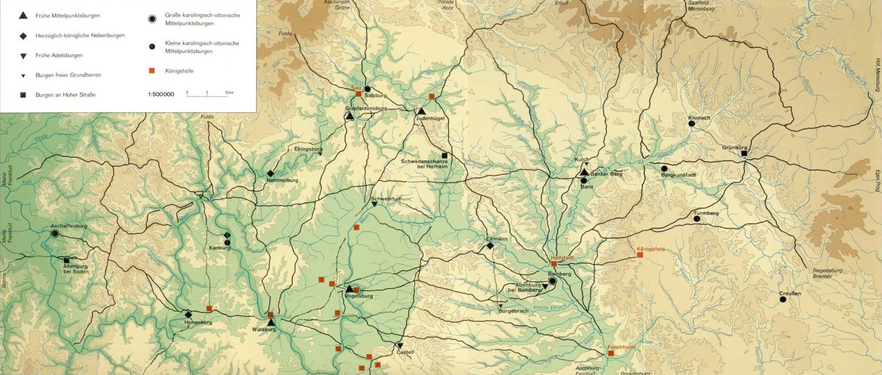 Die Karte zeigt die großen Straßen in Nordbayern und den angrenzenden Gebieten im frühen 9. Jhd.. In der Bildmitte verläuft von Frankfurt nach Eger (Cheb) der sog. "Hochweg", eine wichtige Handelsstraße der damaligen Zeit.